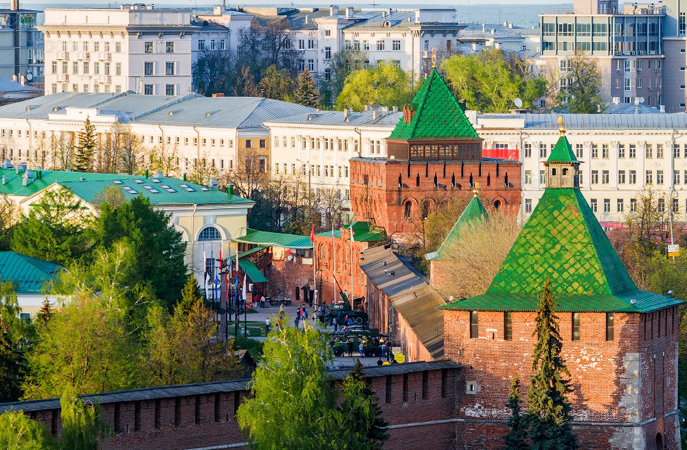 Вид на Никольскую, Кладовую и Дмитриевскую башни Нижегородского Кремля с крыши